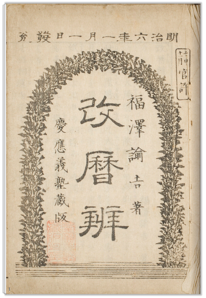 福沢諭吉著『改暦弁』（1873年発行）の表紙画像。『改暦弁』、国立国会図書館デジタルコレクション。